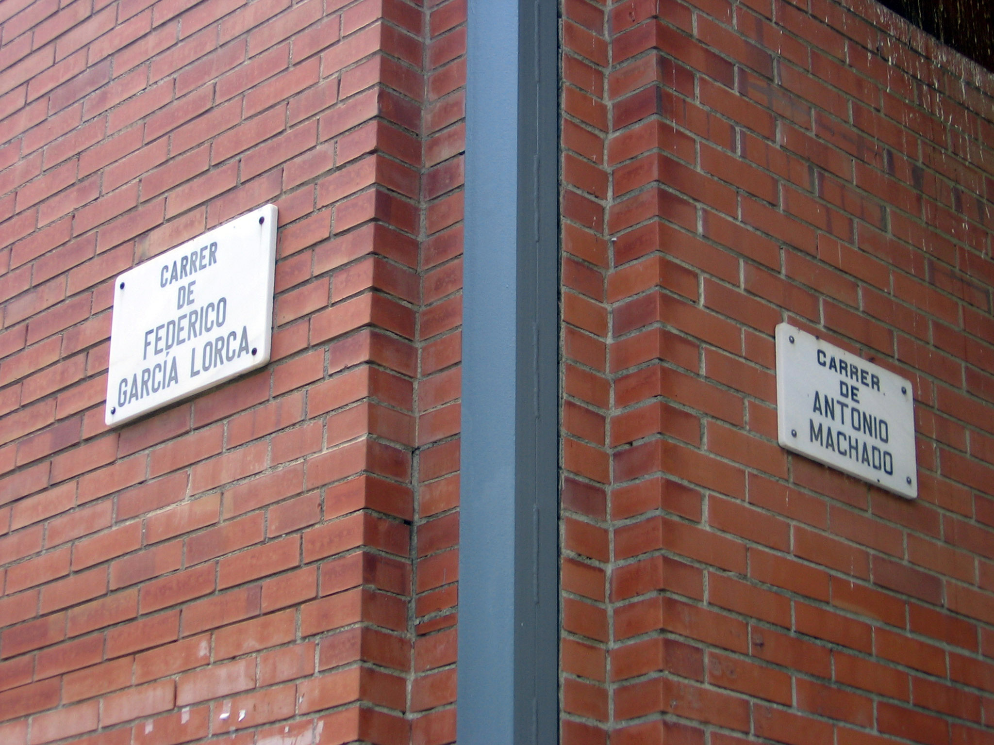 Calles Federico García Lorca y Antonio Machado.